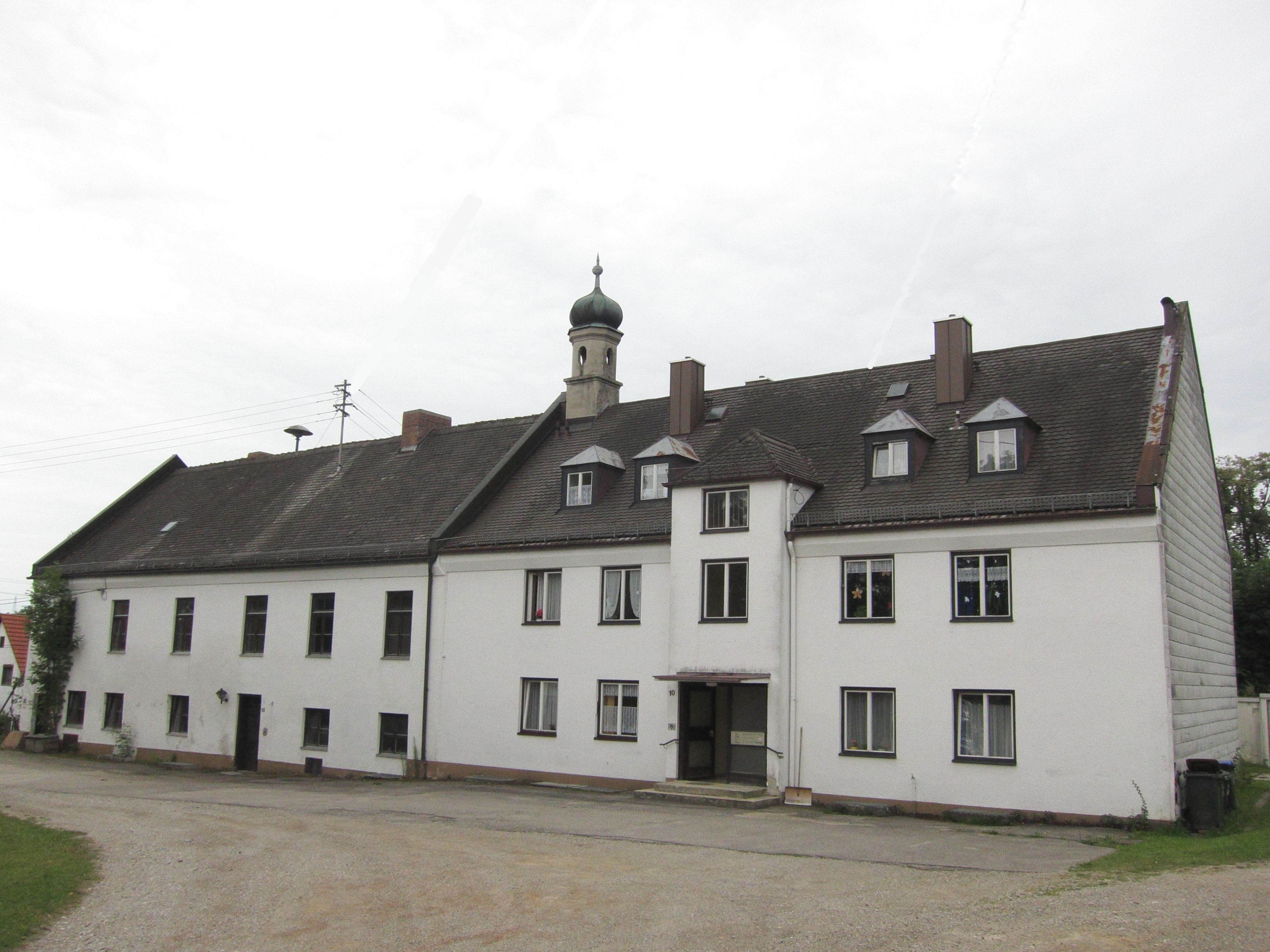 Südflügel des ehem. Hofmarkschlosses Ottenhofen, langgestreckter zweigeschossiger Satteldachbau mit Dachreiter und zwei aufgedoppelten Türen des 18. Jahrhundert, im Kern um 1700.